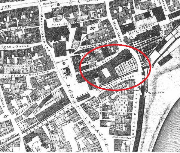 Ingolstadt, Kartenausschnitt von 1816, rot markiert das Augustiner- bzw. (nach 1802) Franziskanerkloster ob der Schutter